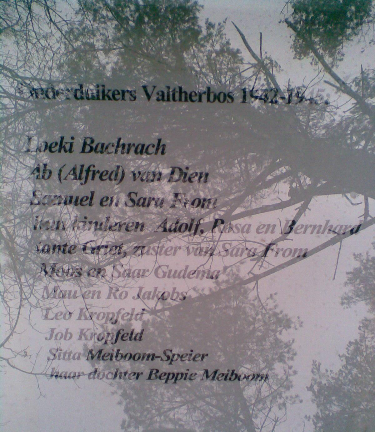 Onderduikers Valtherbos 1942-1945